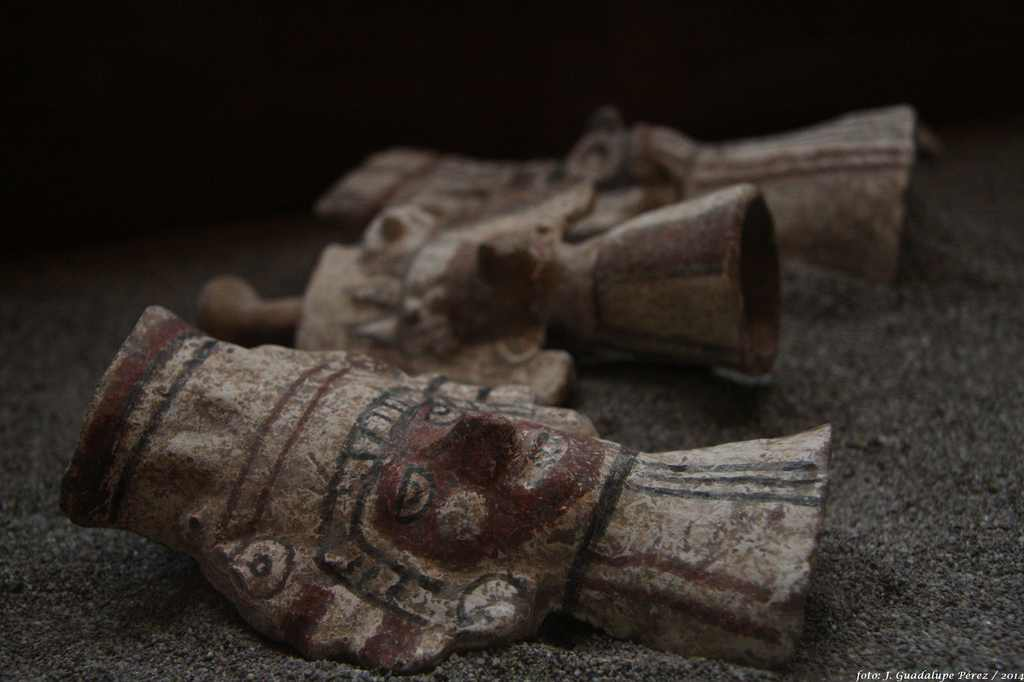 Totolac, Tlaxcala Foto: J. Guadalupe Pérez /2014